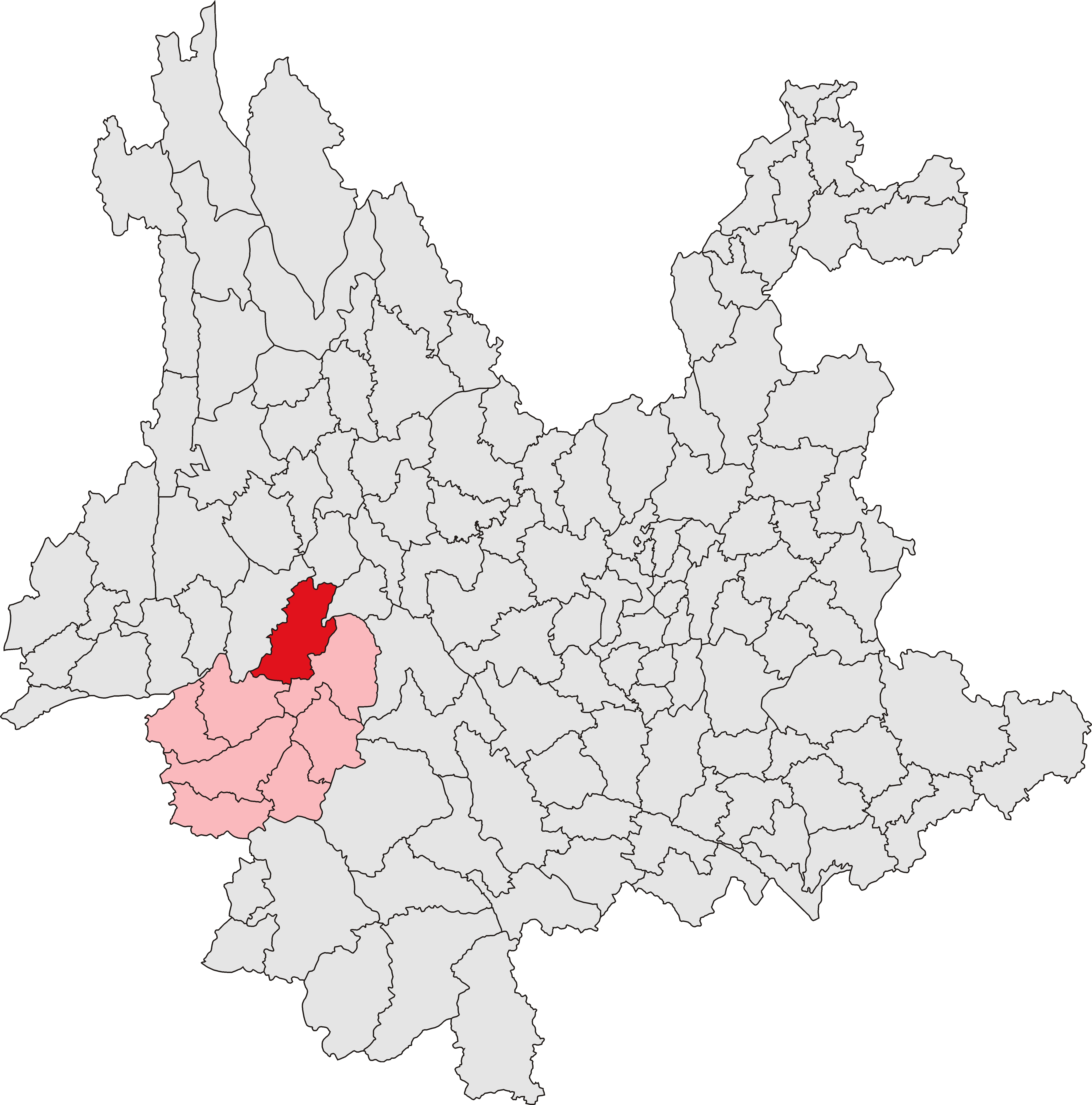 凤庆县位置图